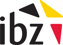 Logo van Federale Overheidsdienst Binnenlandse Zaken (FOD Binnenlandse Zaken)